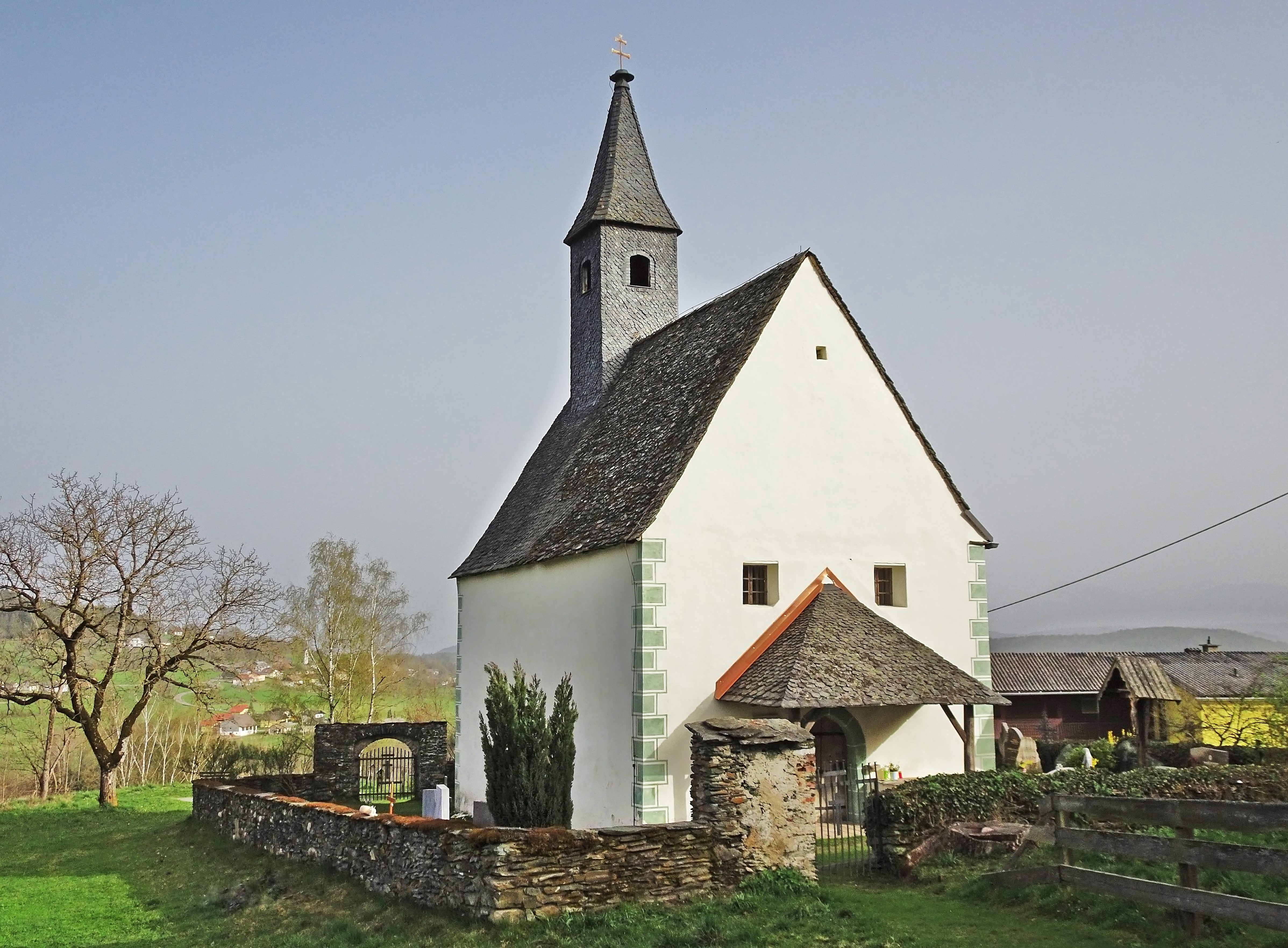 Kath. Filialkirche Briefelsdorf (Feldkirchen in Kärnten) mit Friedhof